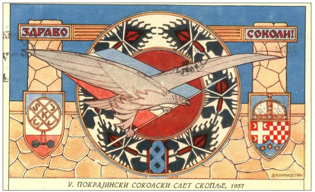 Картичка на Соколската организация „Кралевич Марко“.